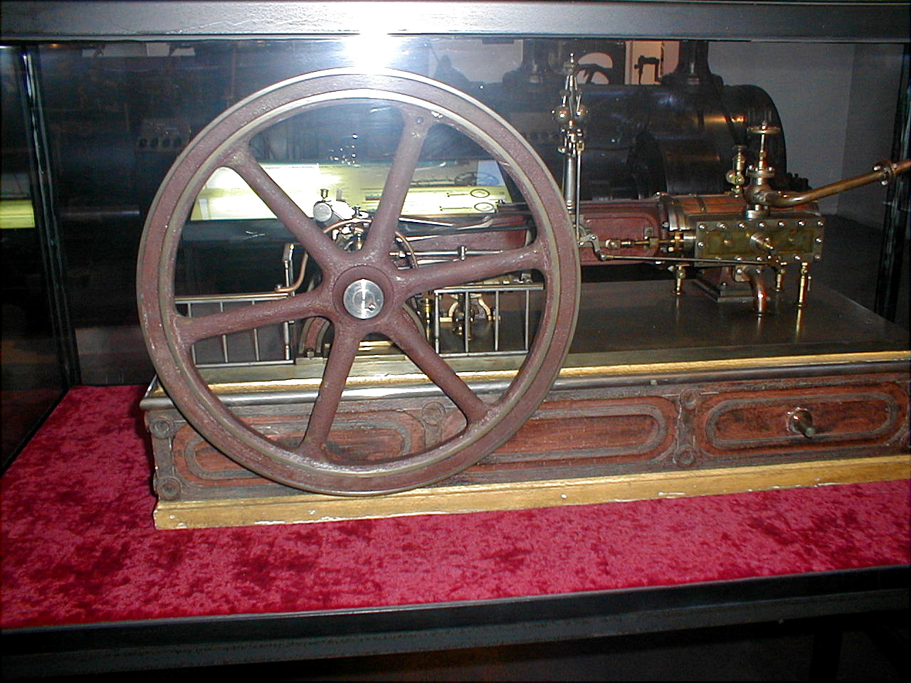 Reproduction d'une machine à vapeur